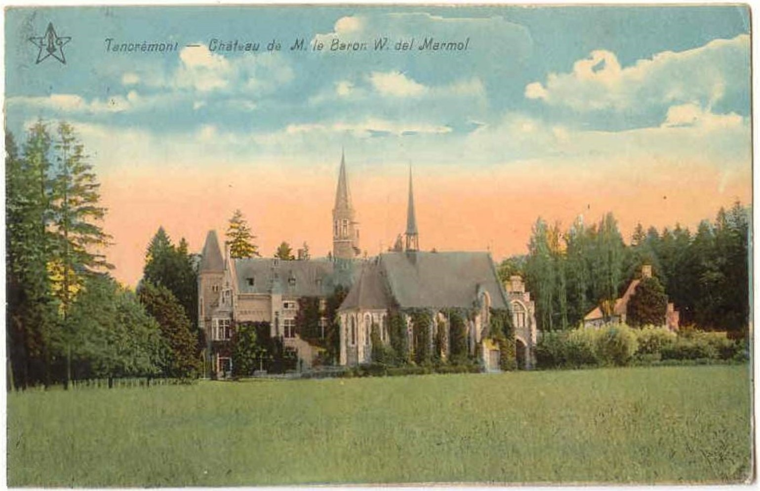 Le château de la famille del Marmol à Tancremont (Pepinster, Province de Liège, Belgique).